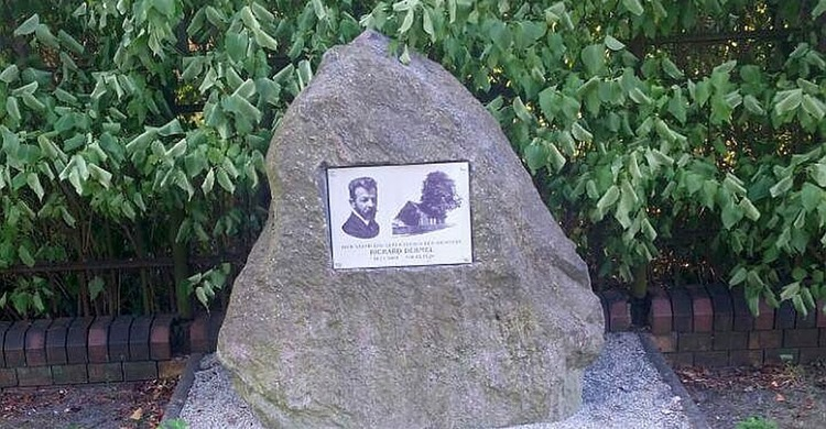 Gedenkstein des Dichters und Lyrikers Richard Dehmel